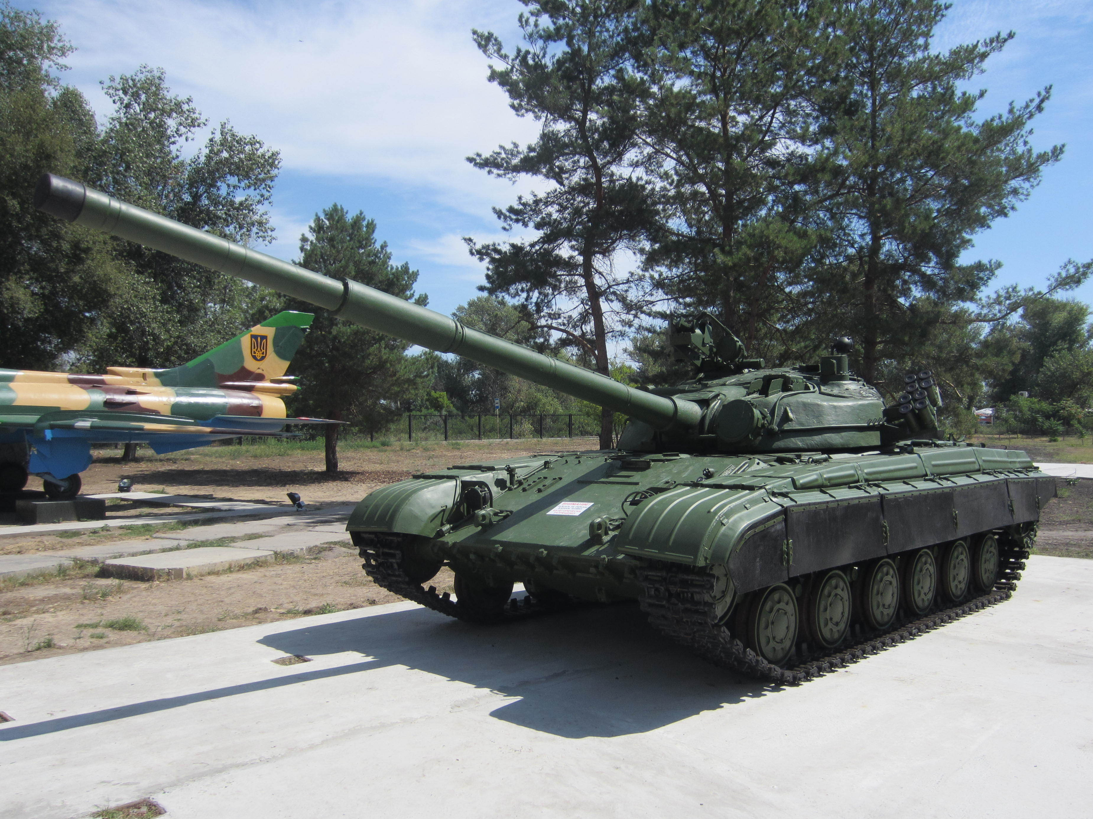 Танк Т-64 в парке Победы. Энергодар